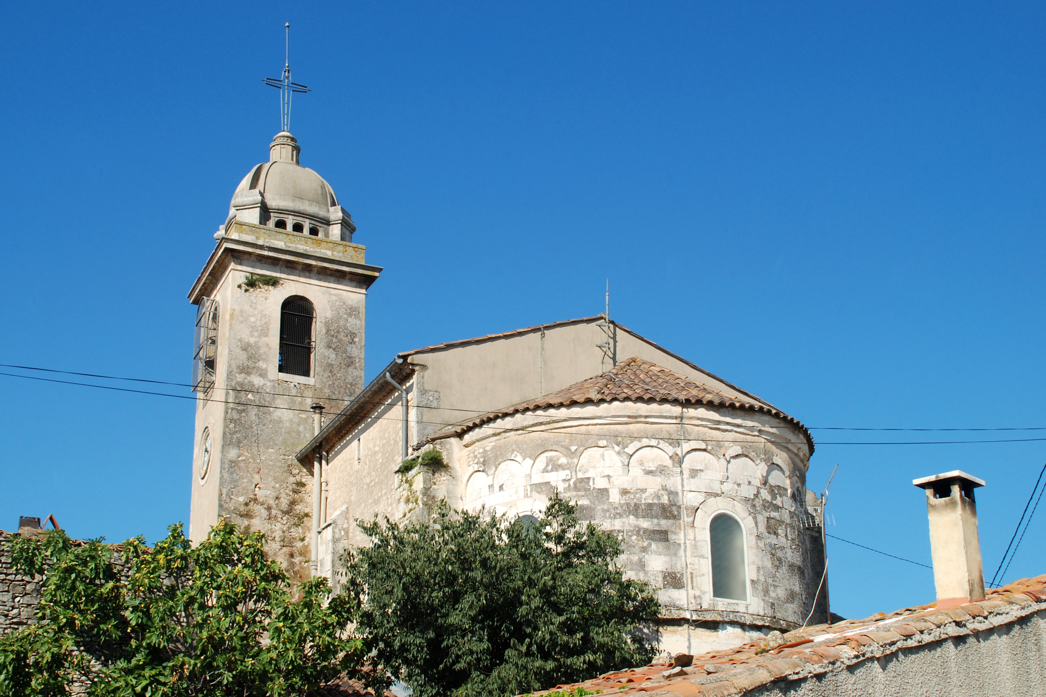 France - Gard - Église de Saint-Césaire-lès-Nîmes